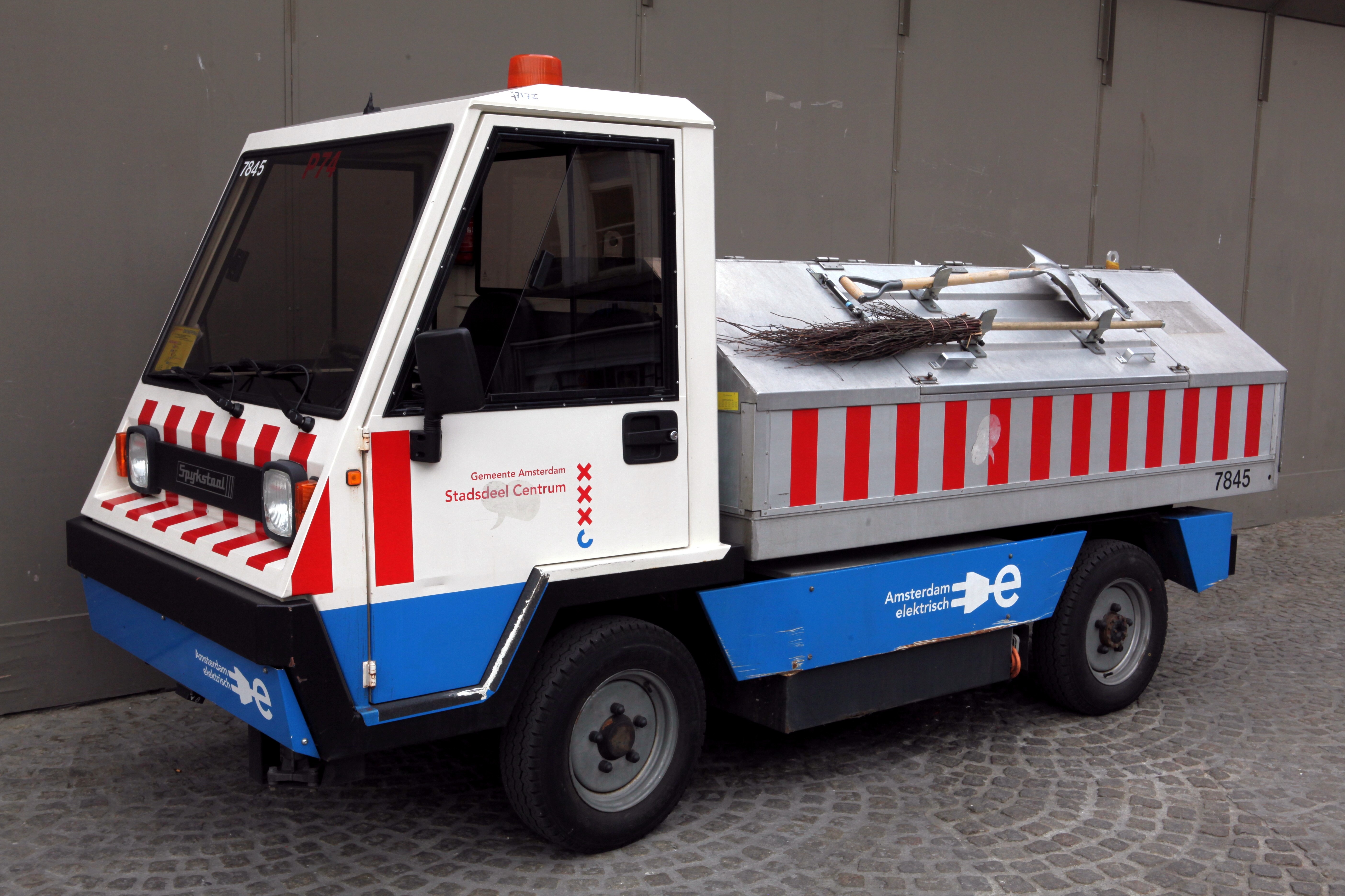 Spijkstaal Gemeente Amsterdam Stadsdeel Centrum